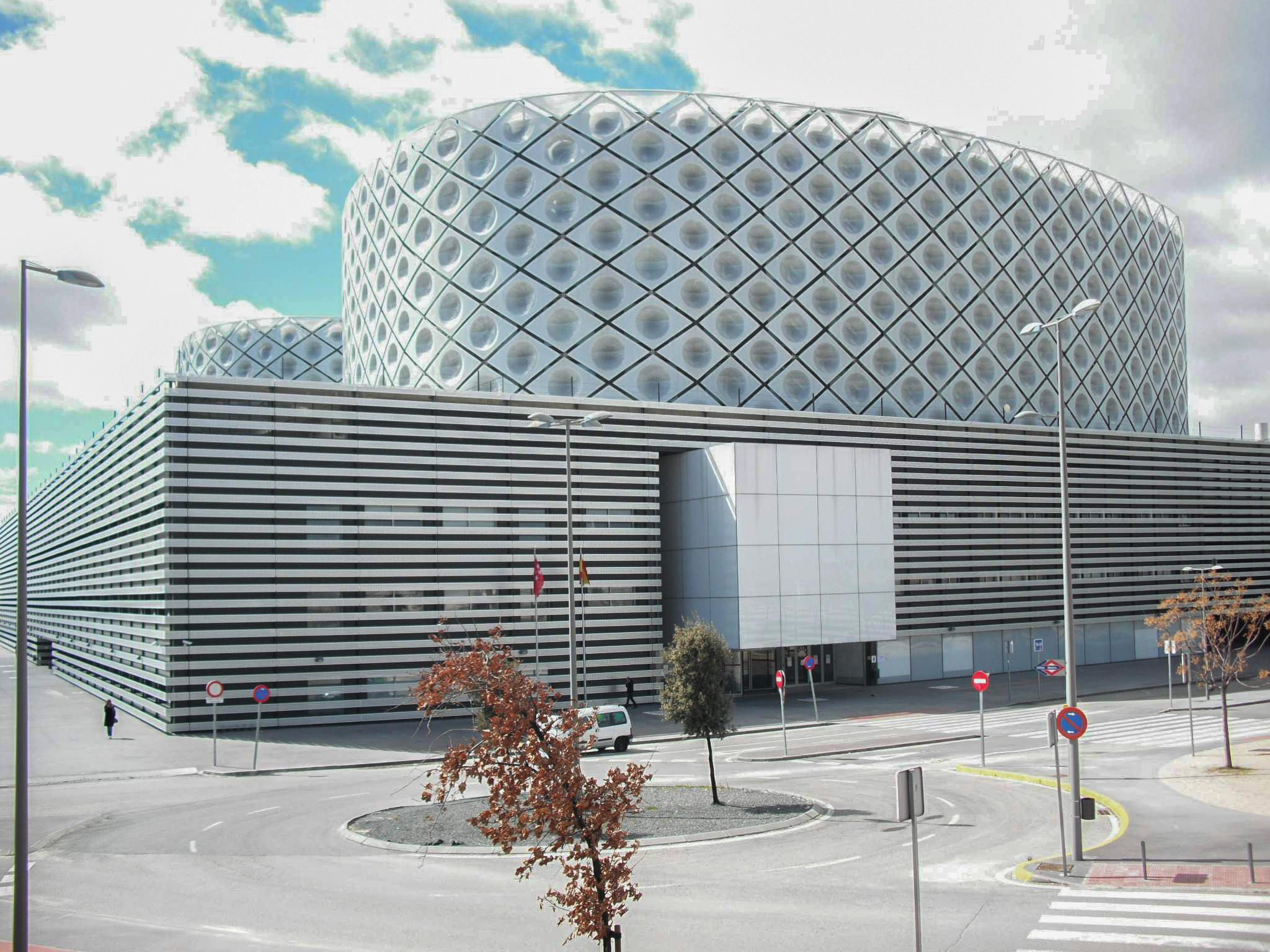 Hospital Universitario Rey Juan Carlos (Móstoles, Comunidad de Madrid)